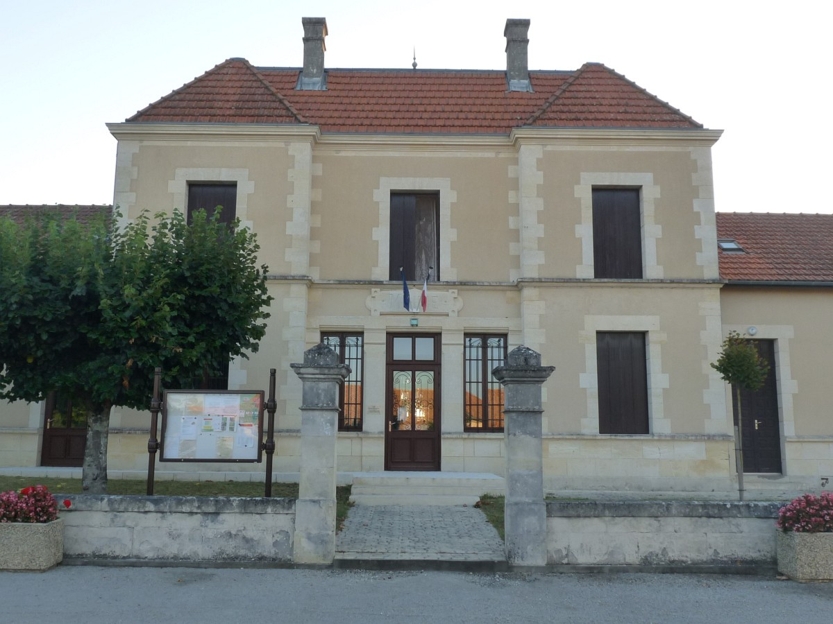 Mairie de St-Martial-de-Mirabeau, Charente-Maritime, France